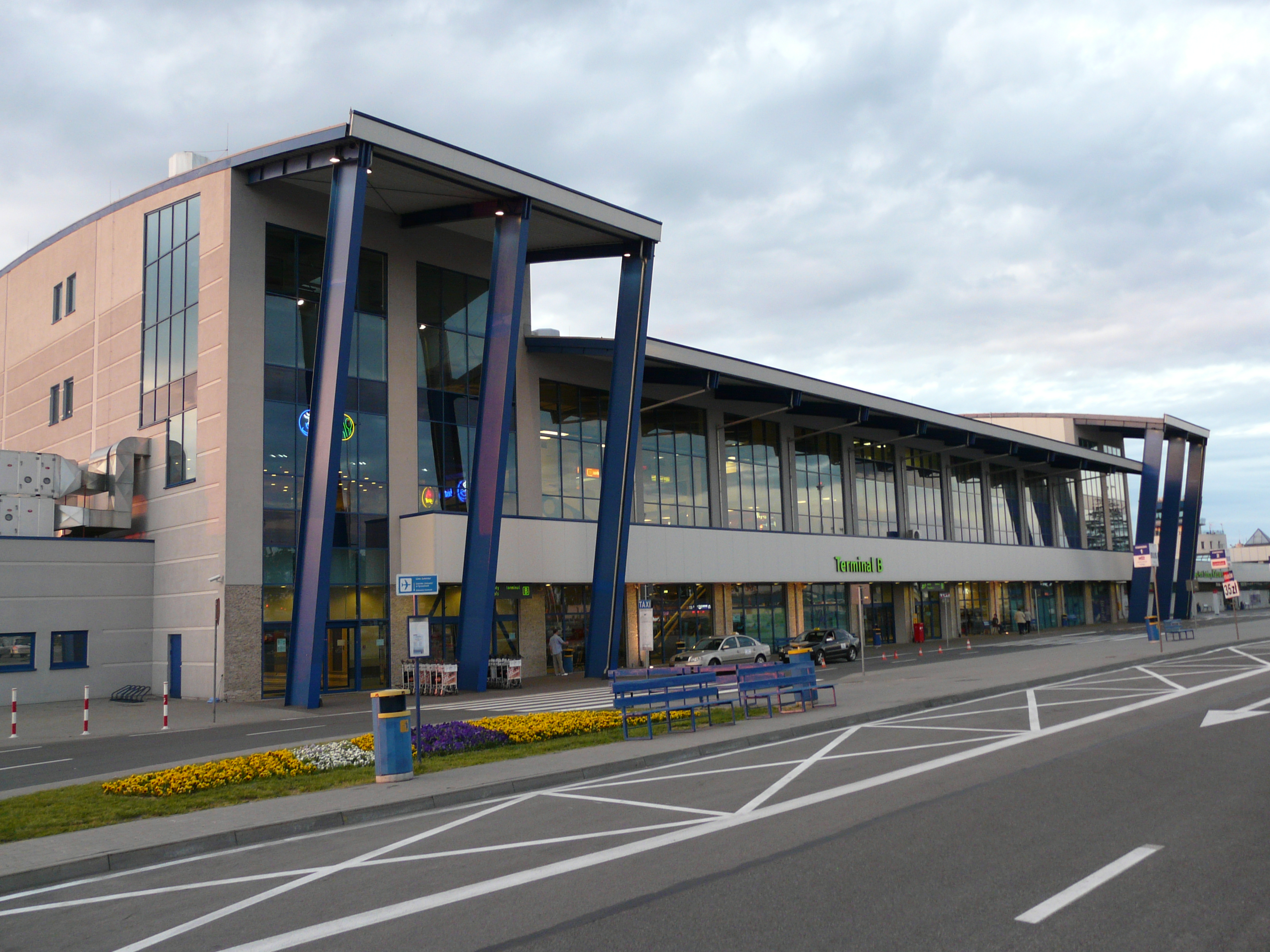 Katowice-Pyrzowice Airport